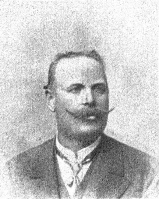 Österreichischer Politiker, Reichsratswahl 1907, Name siehe Dateiname